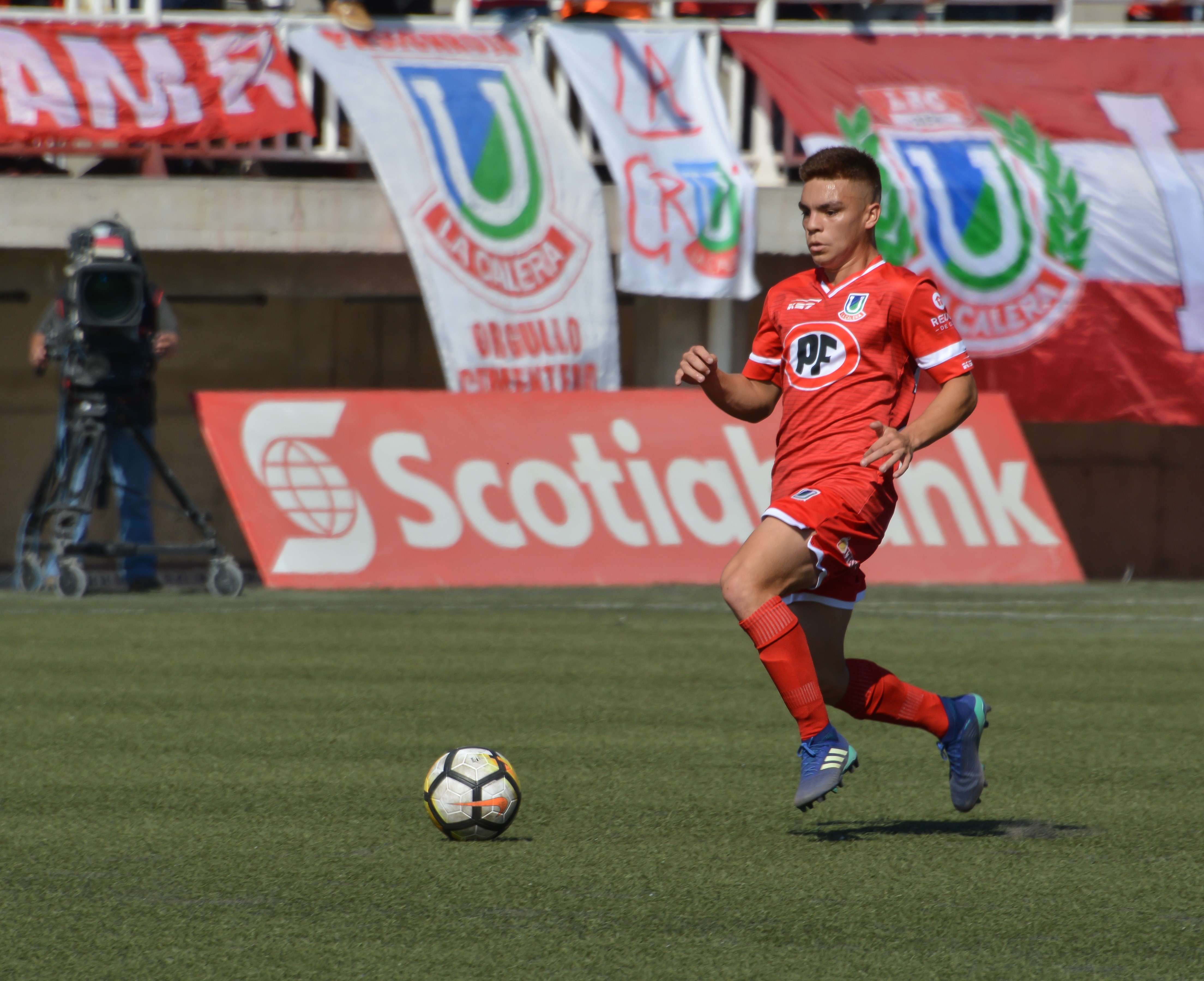 Unión La Calera v Universidad de Chile, Estadio Municipal Lucio Fariña Fernández, Quillota, Chile.